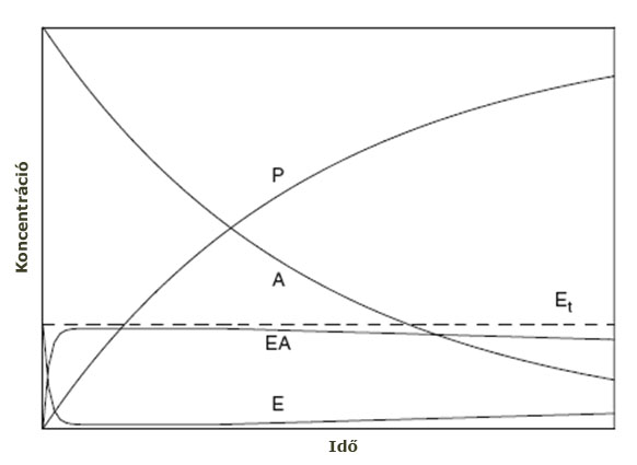 Enzimkinetika